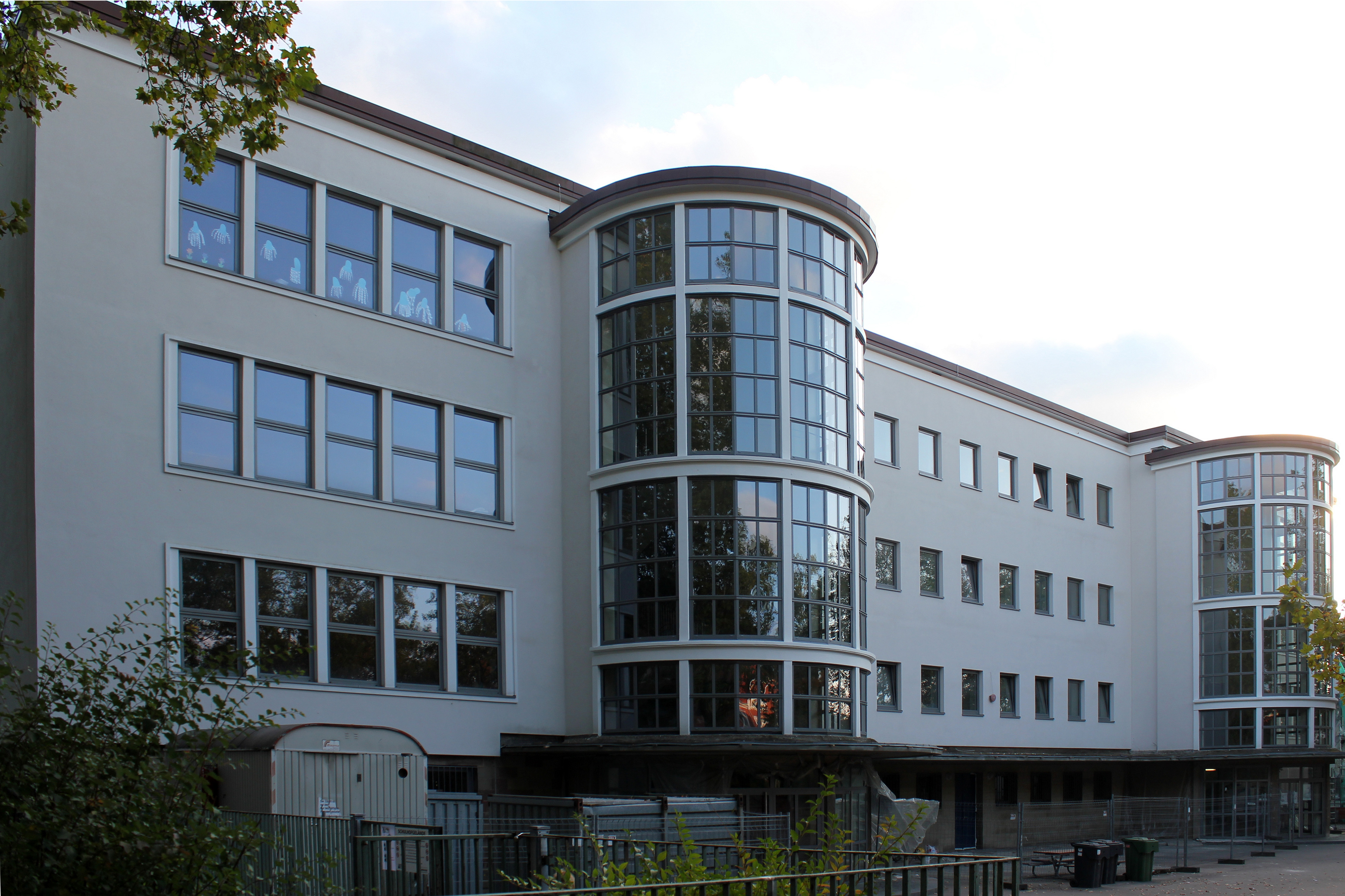 Weyersbergschule, Saarbrücken-Burbach, erbaut 1950-52 von Peter Paul Seeberger, Saniert 2011-13